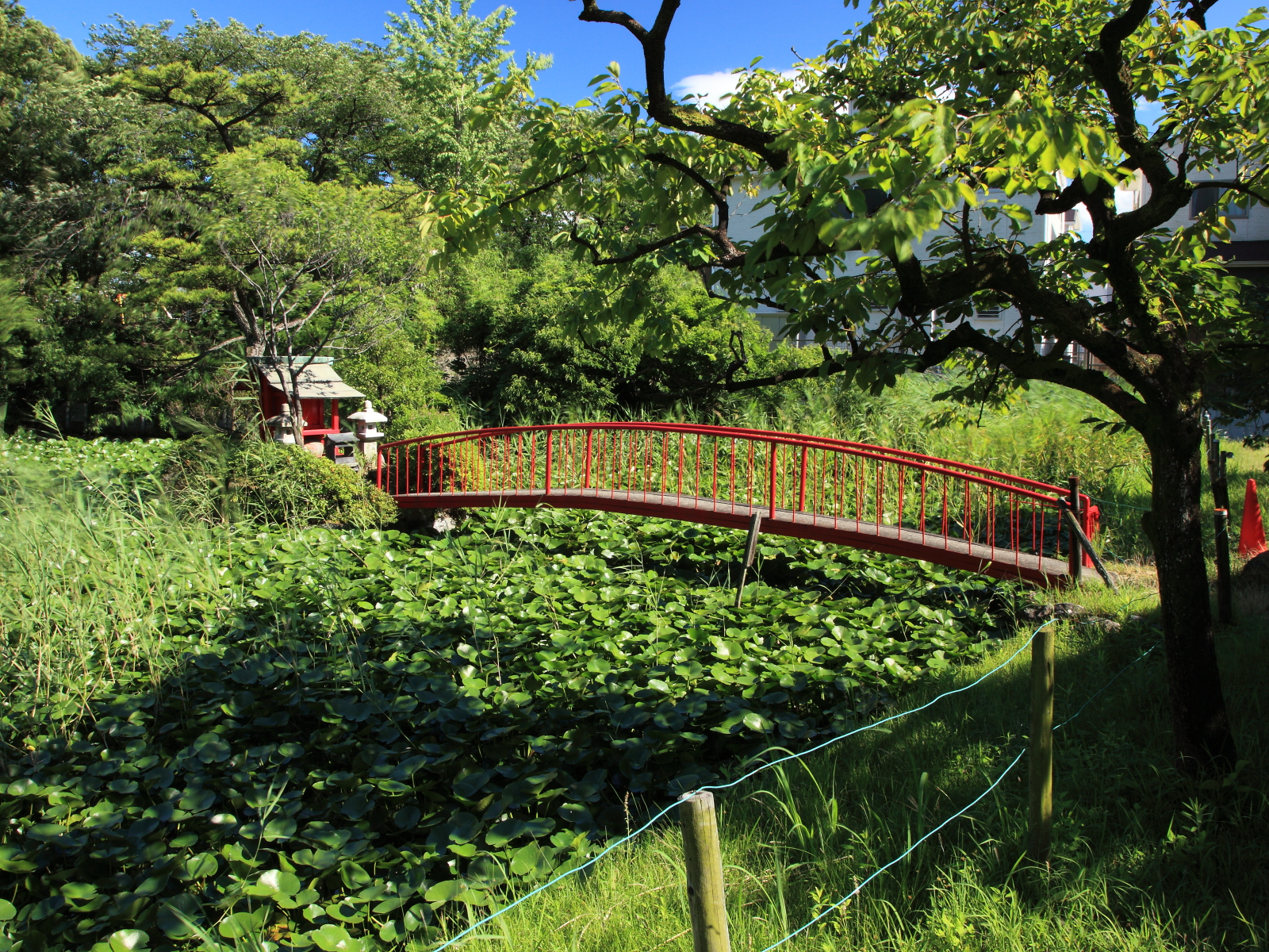 和光山長福寺放生池（名古屋市緑区、2012年）